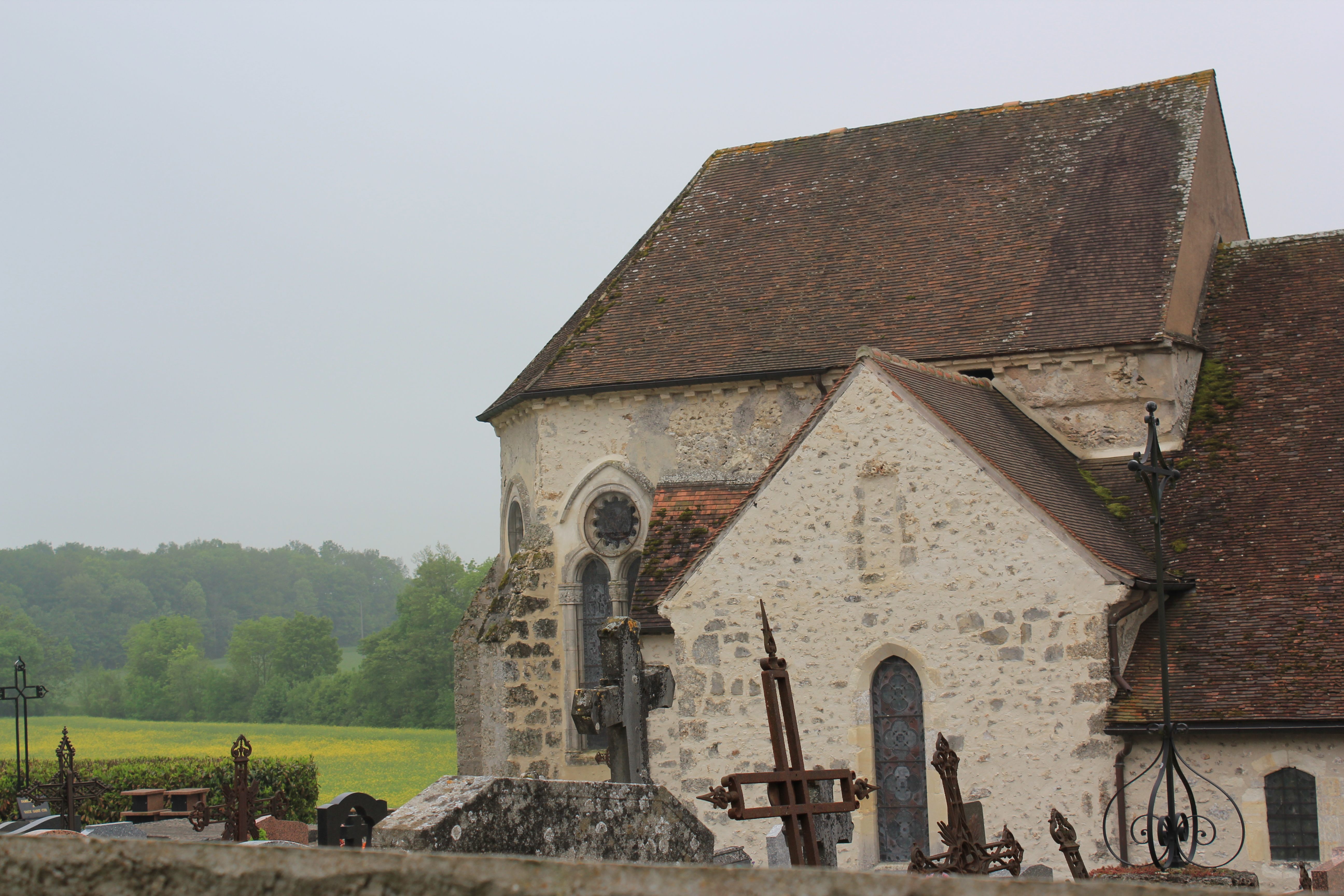 Chevet de l'église Saint-Laurent de Rieux. .